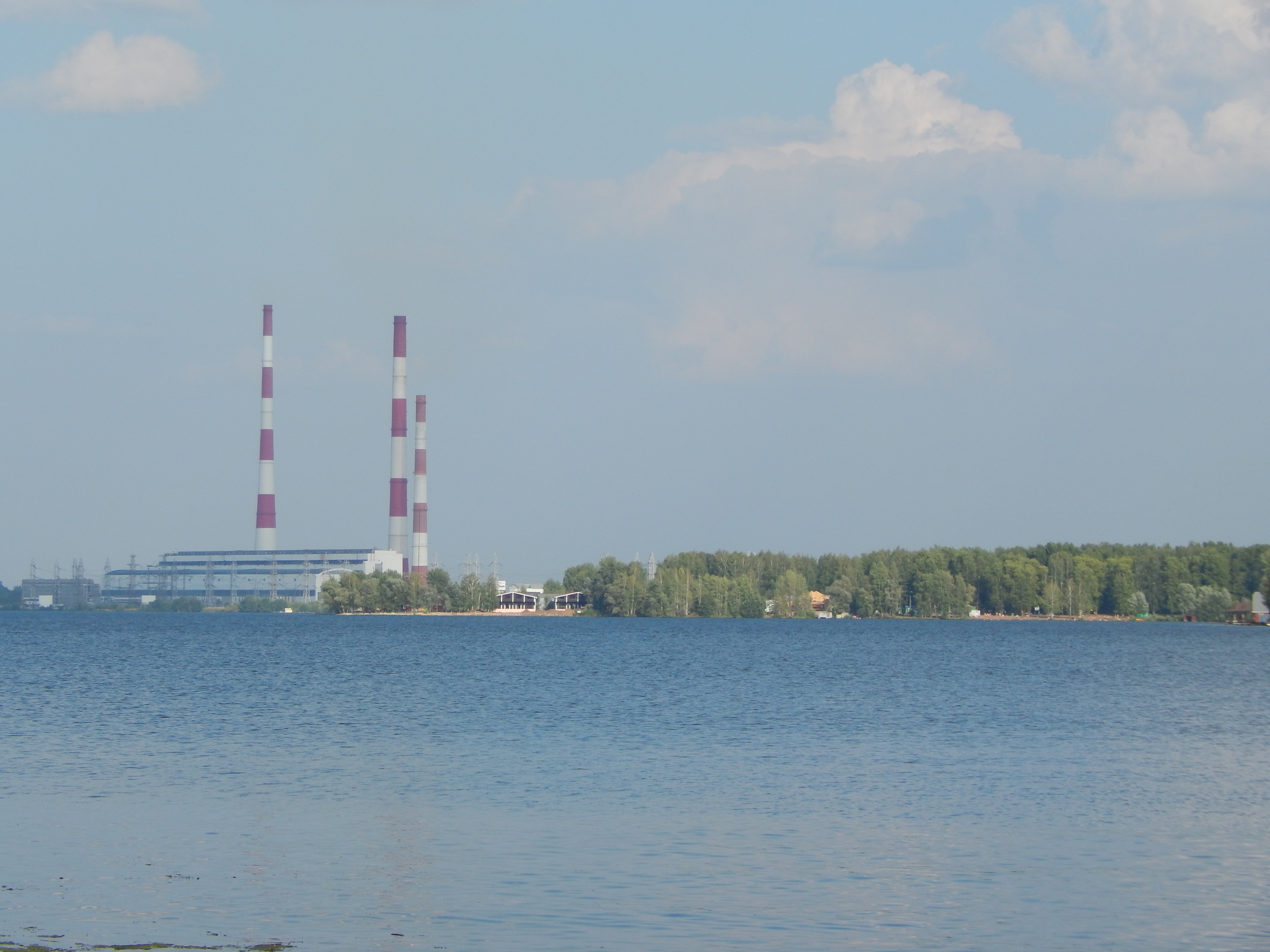 Кармановское водохранилище